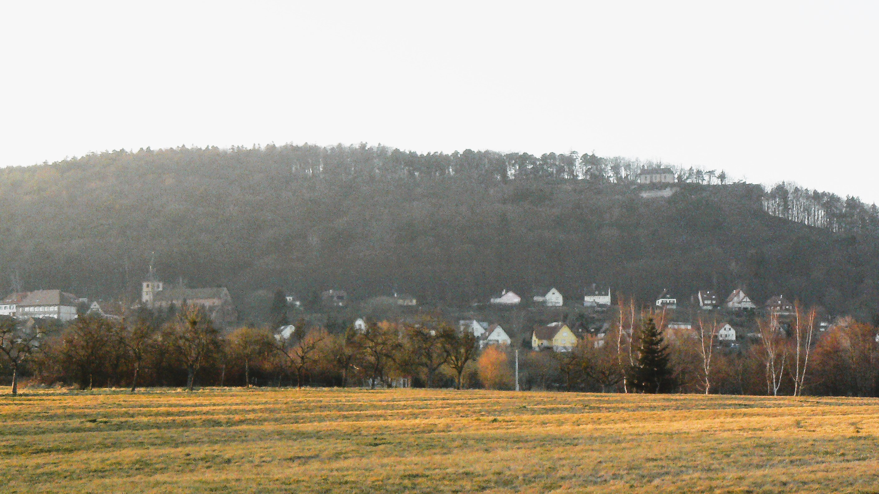 Saint Jean Saverne et le Mont Saint Michel (Bas Rhin)